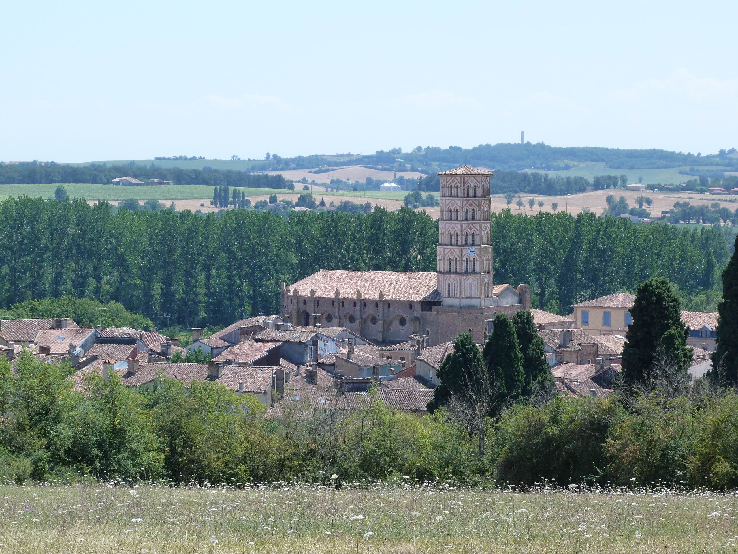 Cathédrale de Lombez, vue de la chapelle St-Majan